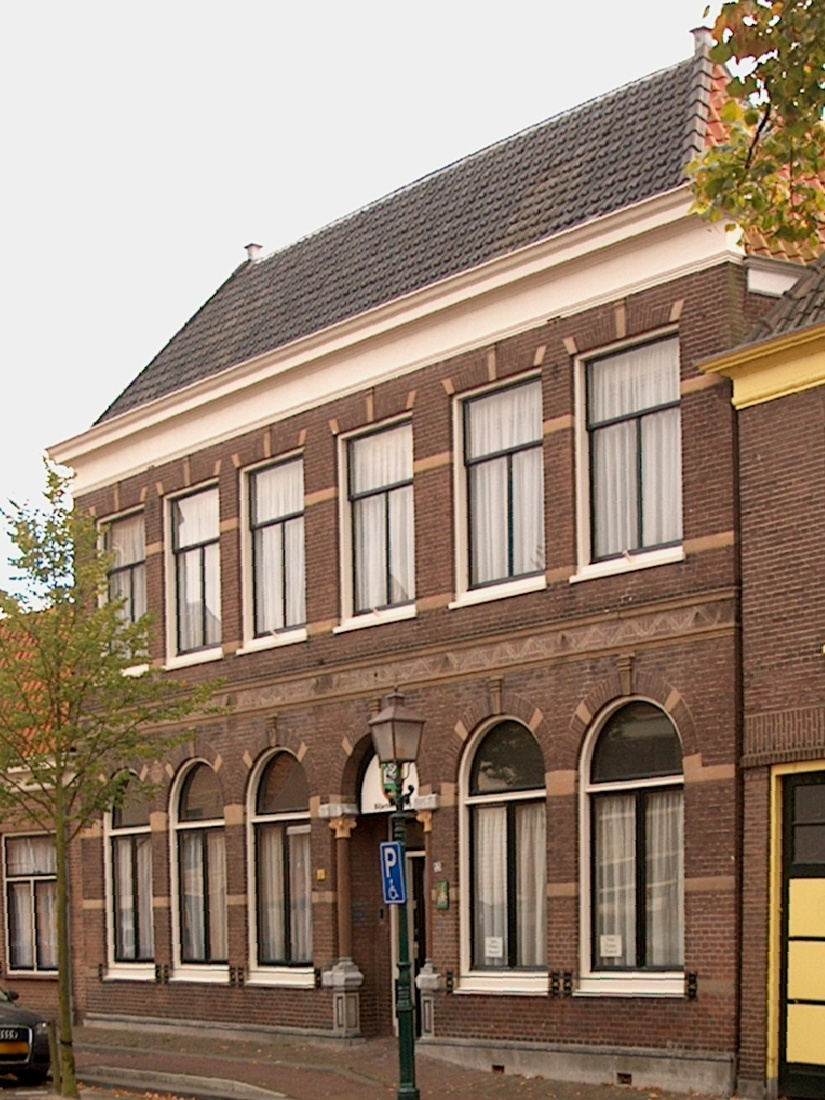 Gebouw van biljartvereniging Horna; voormalig Parkhotel, later koffiekamer van de Parkschouwburg; Achterom 53, Hoorn, Noord-Holland.